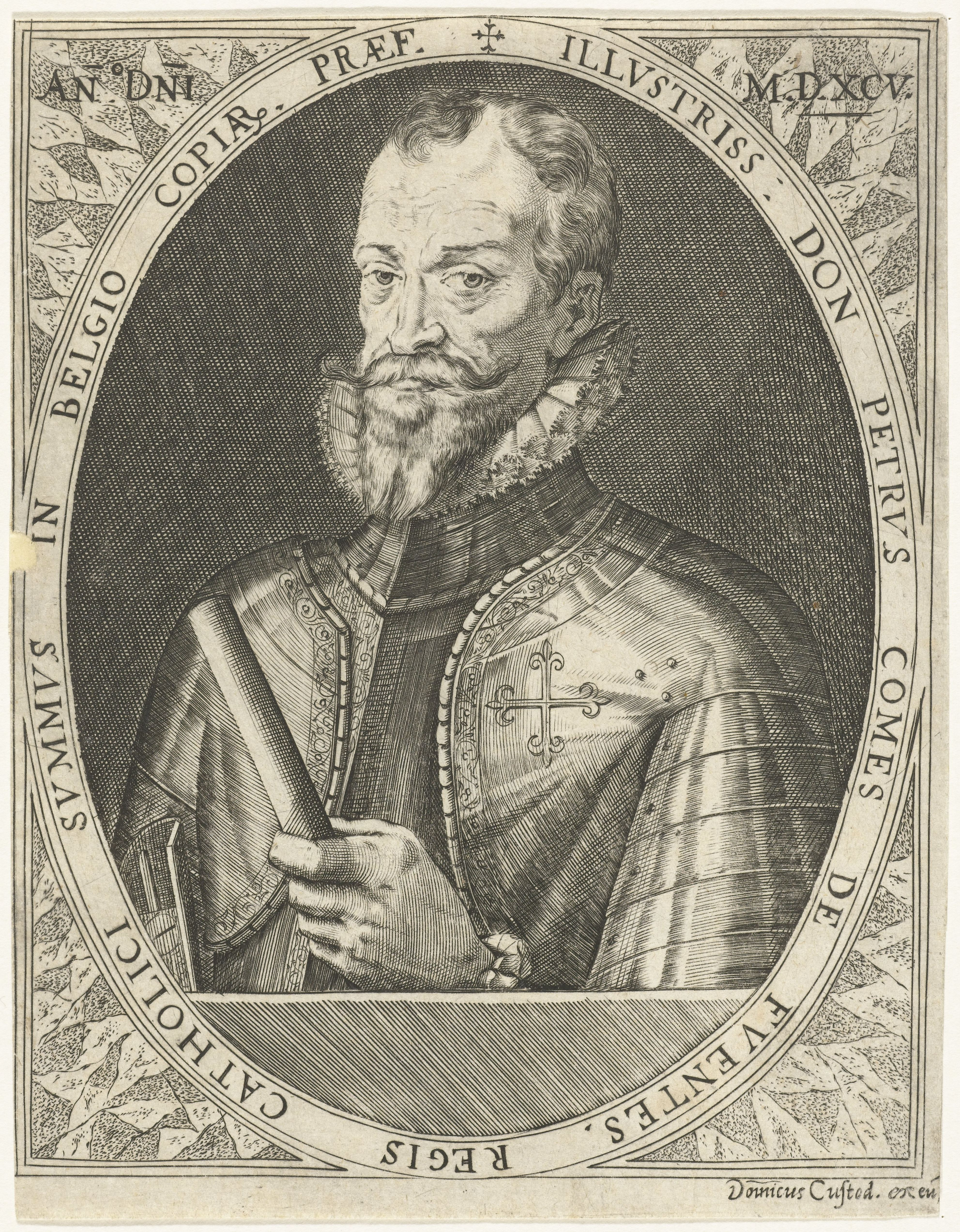 Illustrissimus don Petrus Comes de Fuentes, Regis Catholici summus in Belgio copiarum Praefectus